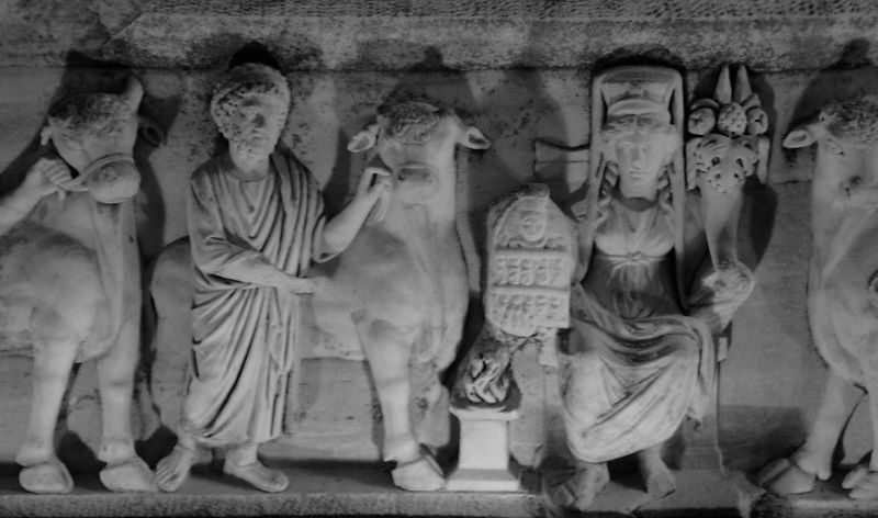 Detail aus einem Fries vom Theater in Perge im Museum Antalya; Opferszene; in Graustufen umgewandelt wegen blaustich durch Kunstlicht im Museum (Blitzverbot)